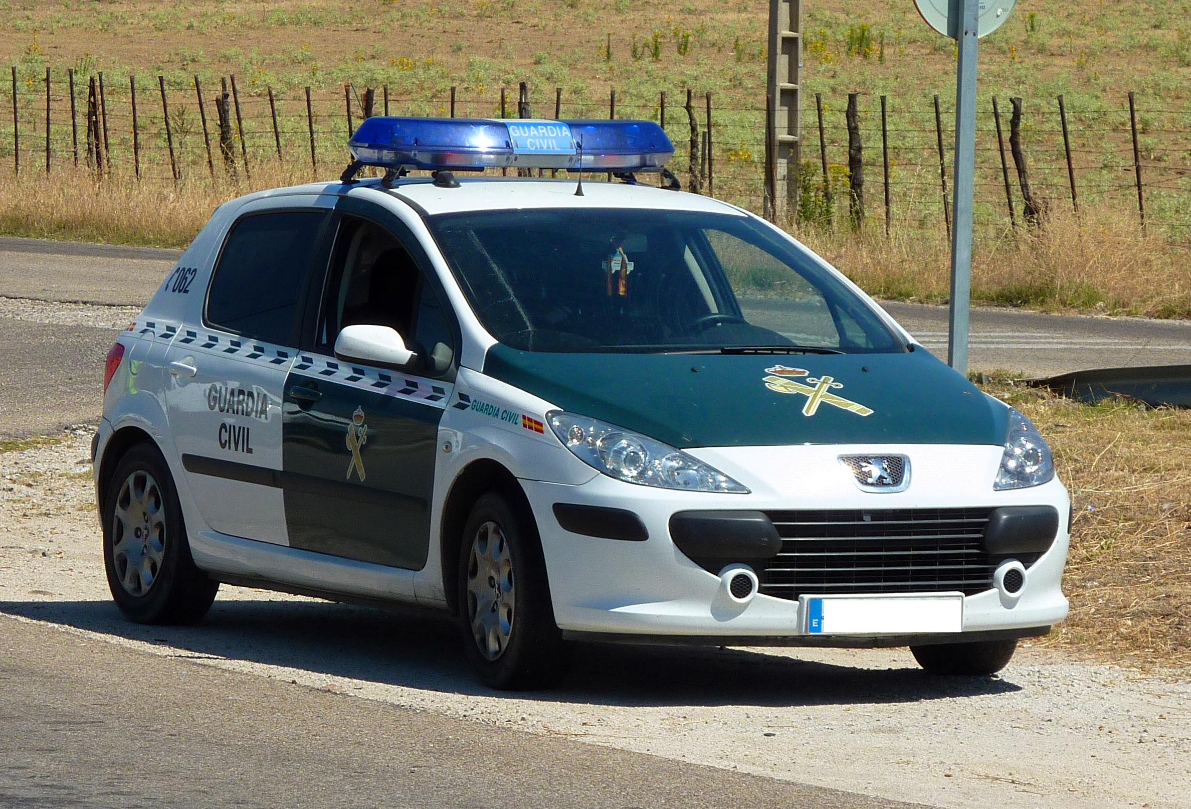 Peugeot 307 de la Guardia Civil.